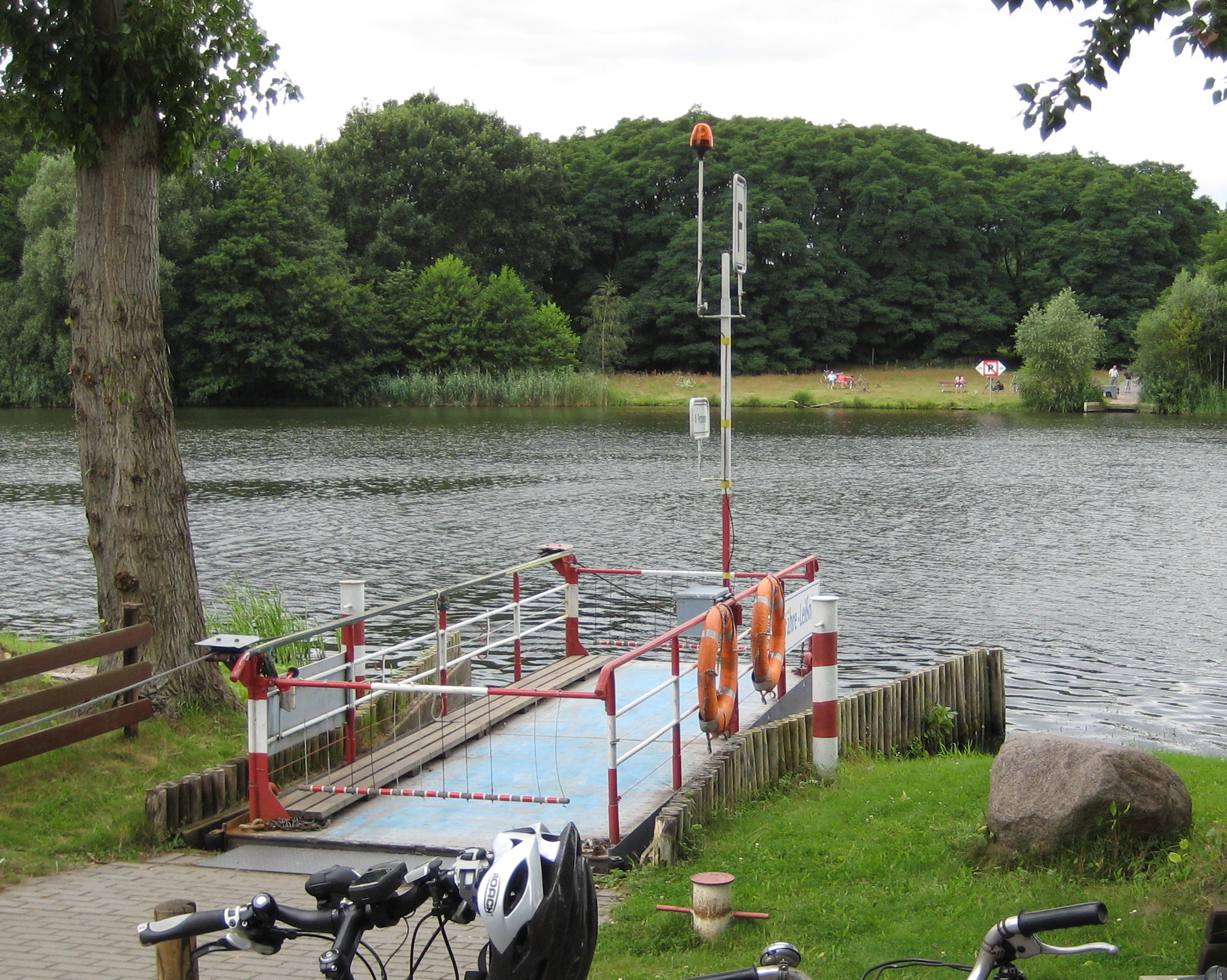 Fähre Ranzig über die Spree / Schwielochsee